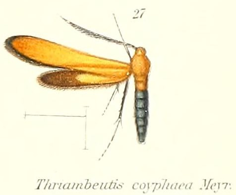 Thriambeutis coryphaea